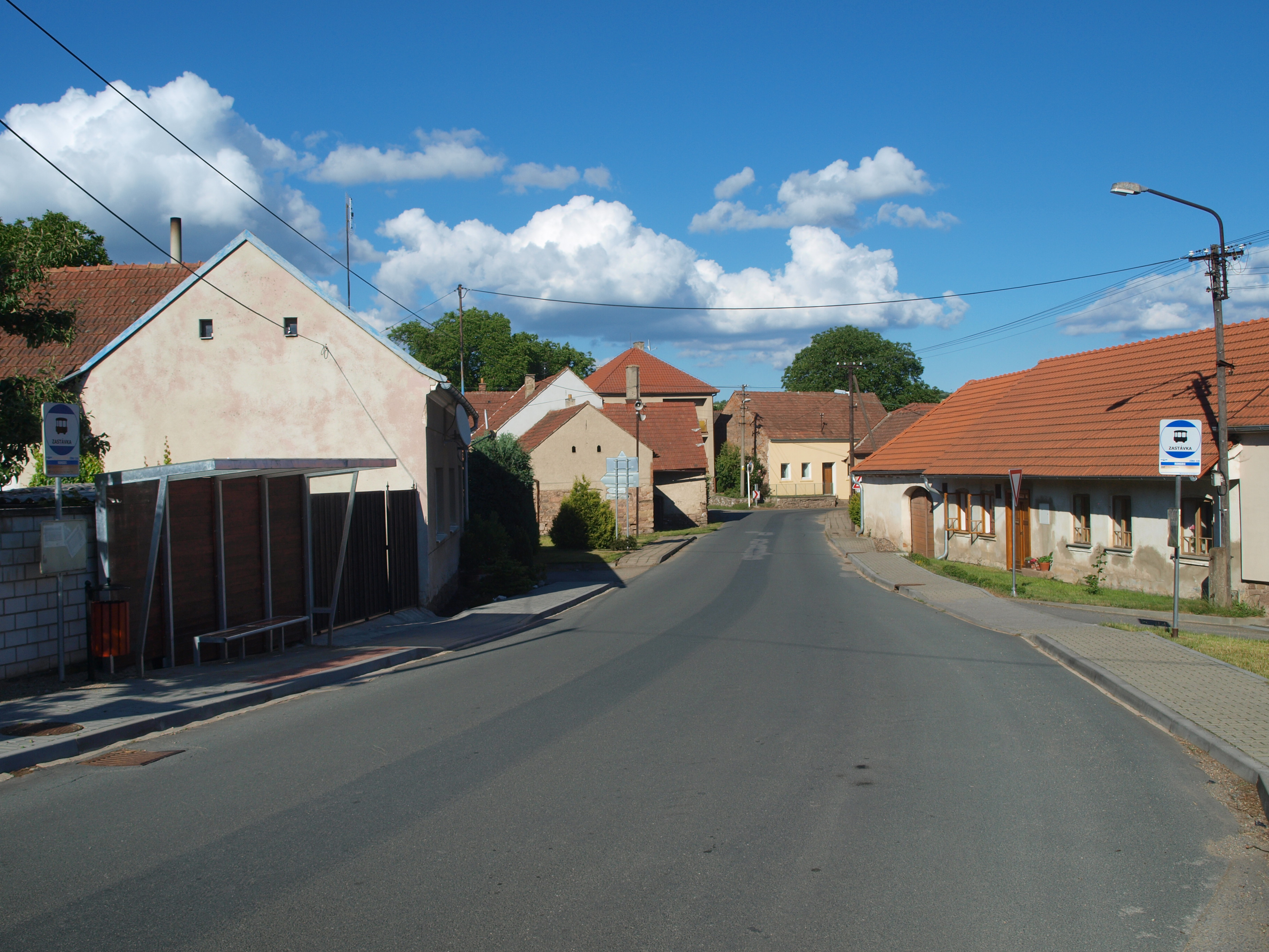 Náves v obci Rohozec v okrese Brno-venkov